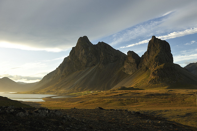 Der 757 m hohe Hvalnesfjall ist nach dem an seinem Fuß befindlichen, mittlerweile verlassenen Hof Hvalnes benannt. Er liegt am Eystrahorn, welches das östliche Ende der Bucht Lónsvík markiert.